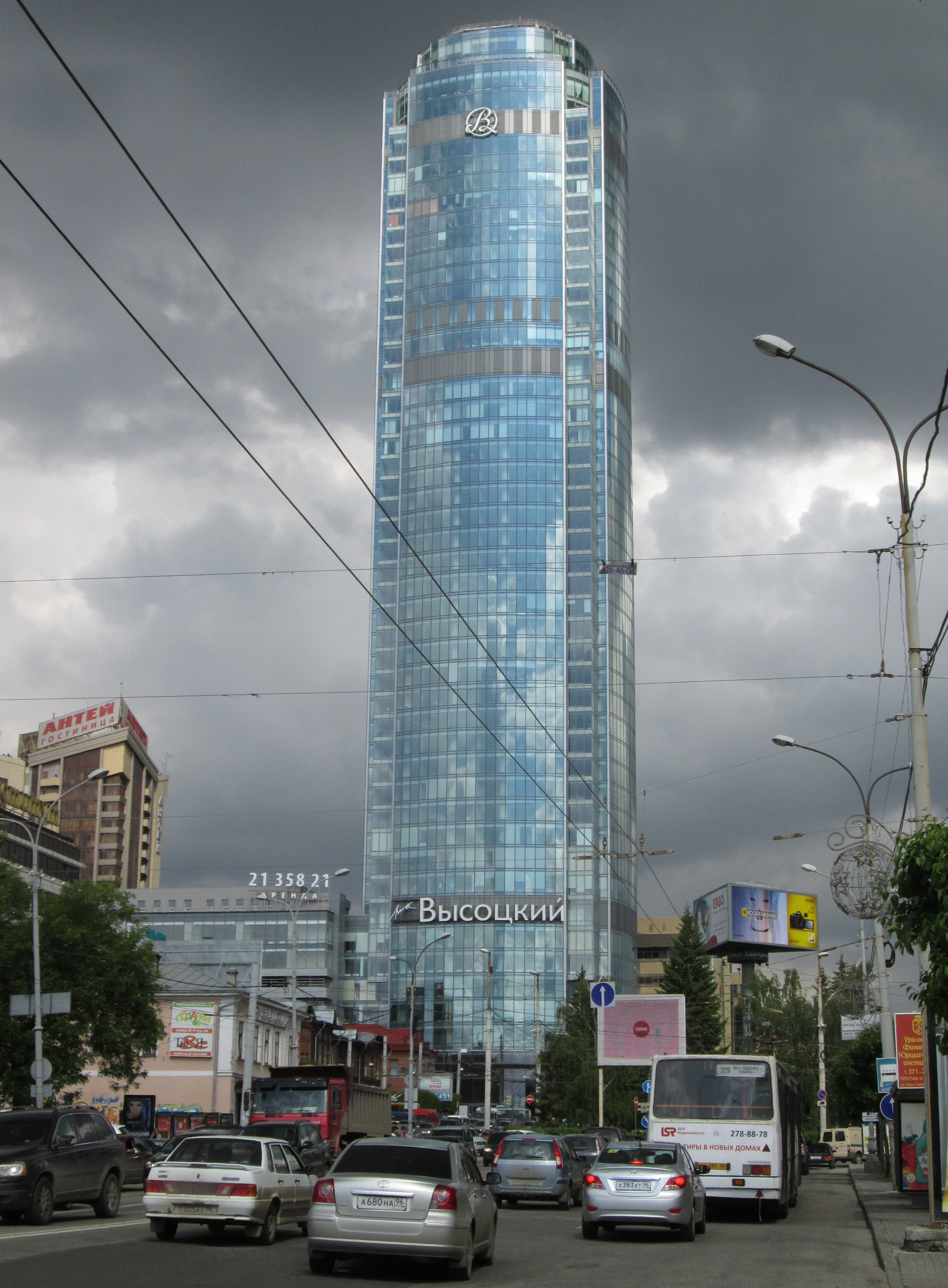 Западный фасад здания.